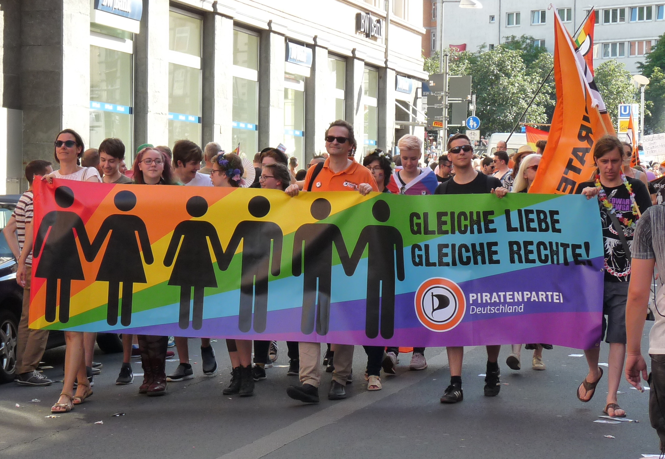 Stuttgart - CSD 2016 - Parade - Piratenpartei Stuttgart